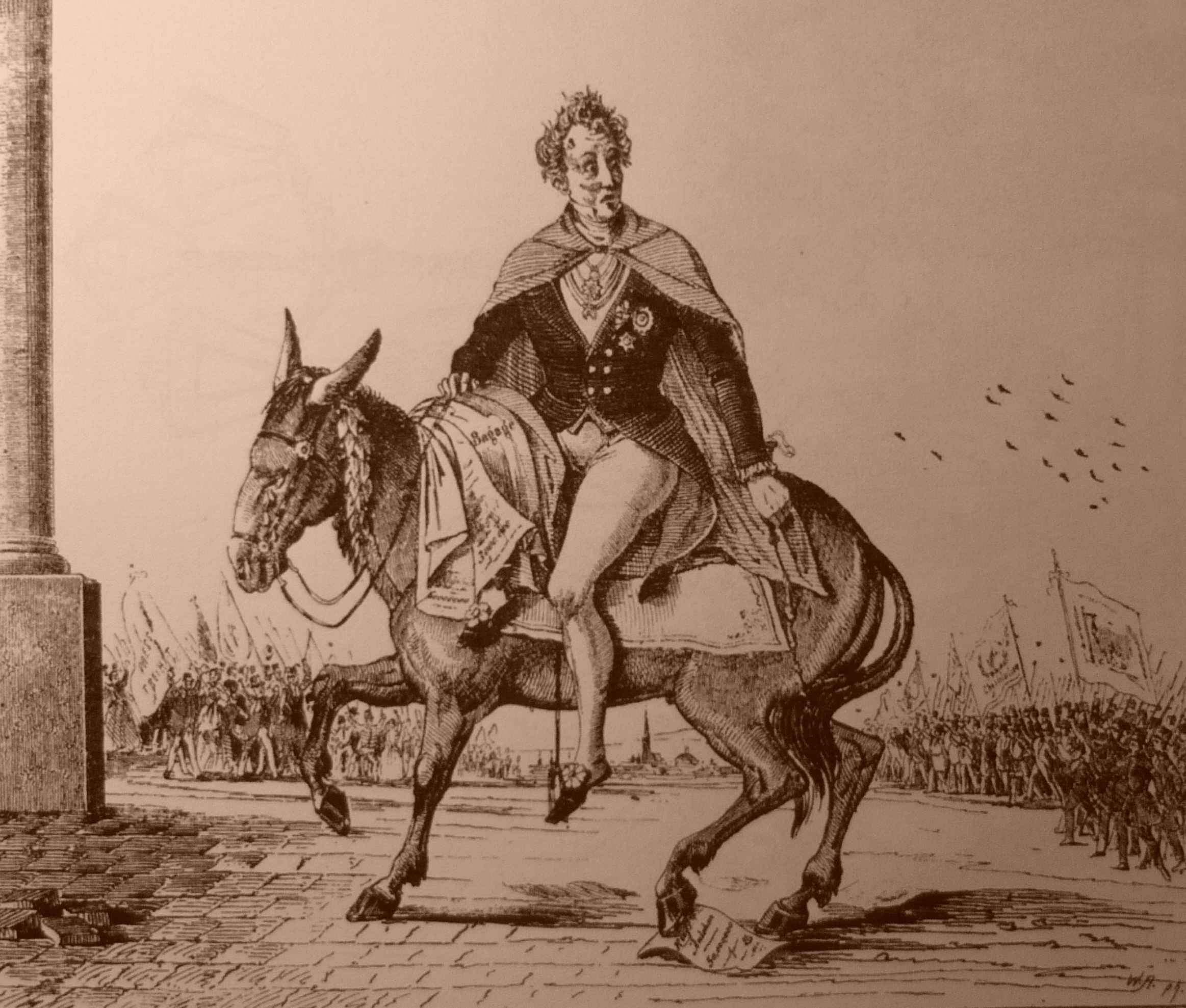 Metternich futása (A bécsi márciusi forradalom idején megjelent gúnykép)